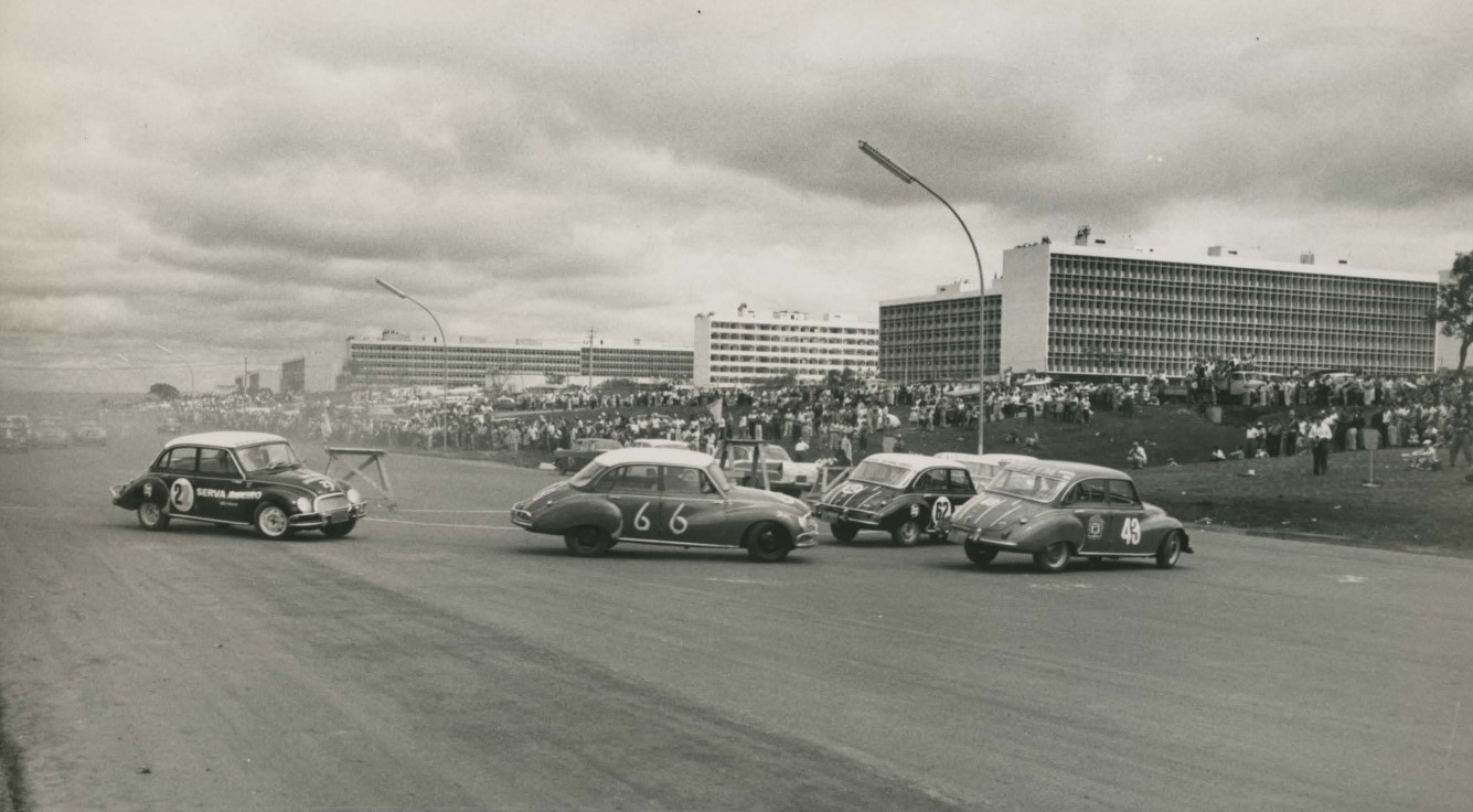 Fotografia do Fundo Correio da Manhã, sob a guarda do Arquivo Nacional.